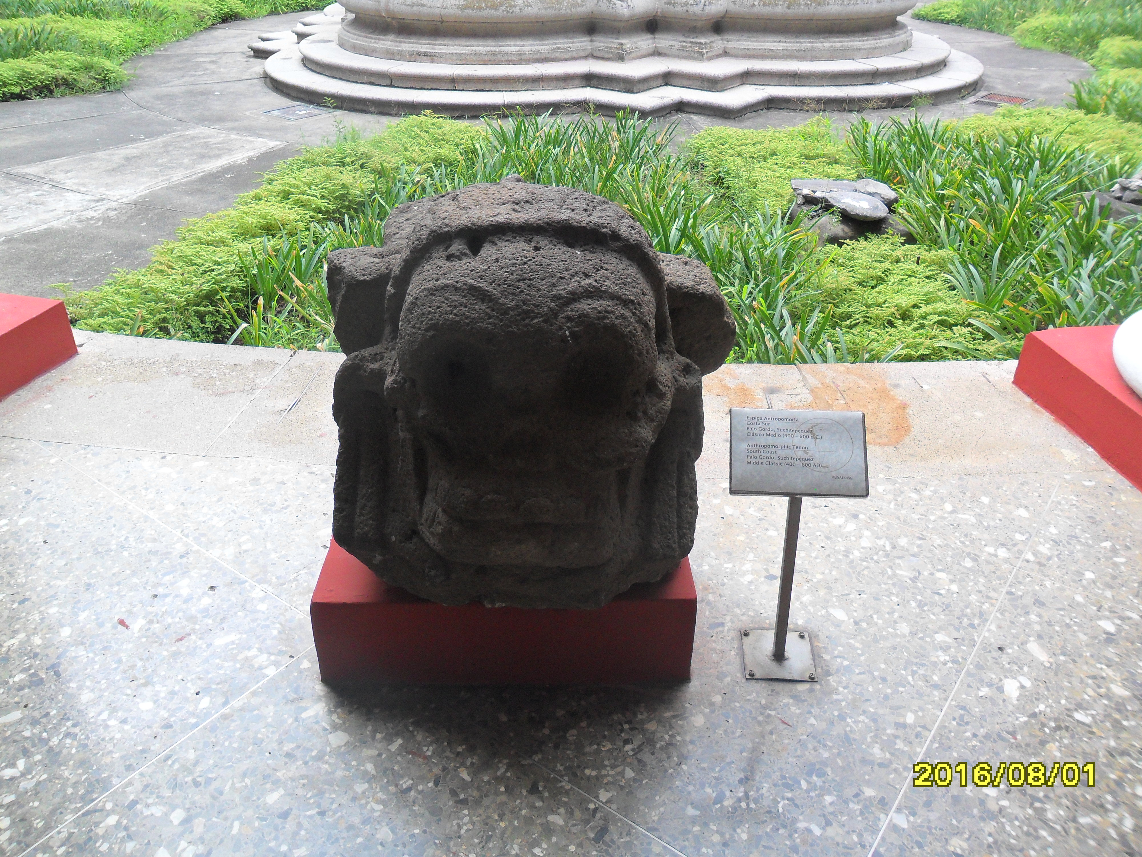 Espiga Antropomorfa, Palo Gordo, Suchitepequez, ubicada en el Museo nacional de Arqueologia y Etnologia de Guatemala